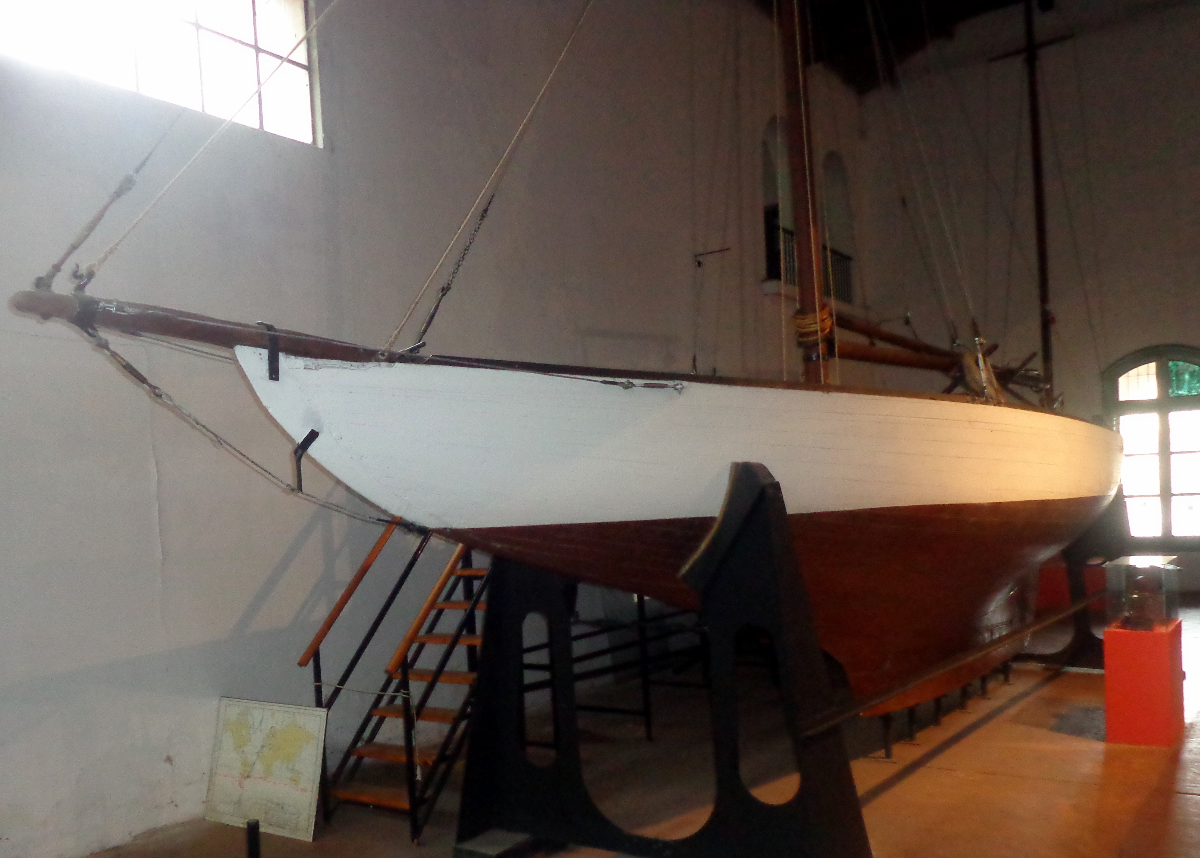 Lehg I, yate con el cual Vito Dumas realizó la travesía Arcachón – Buenos Aires, batiendo así el récord mundial de navegación de un hombre solo.